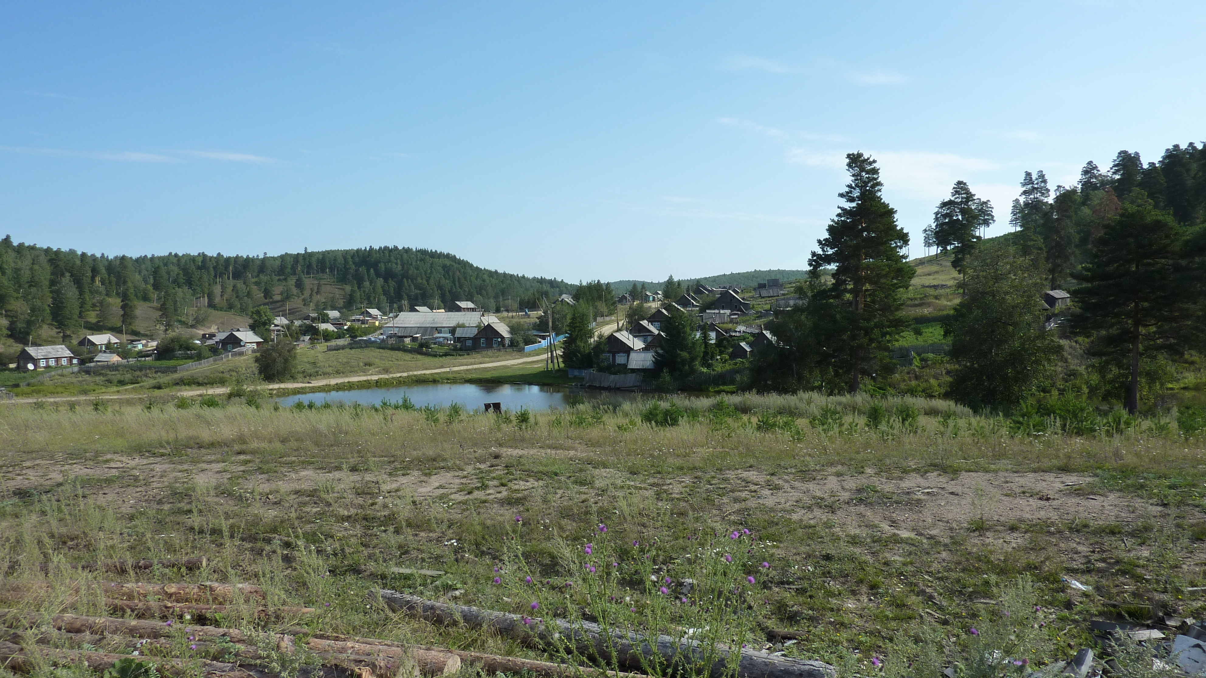 Вид на Шанский (Шанск)